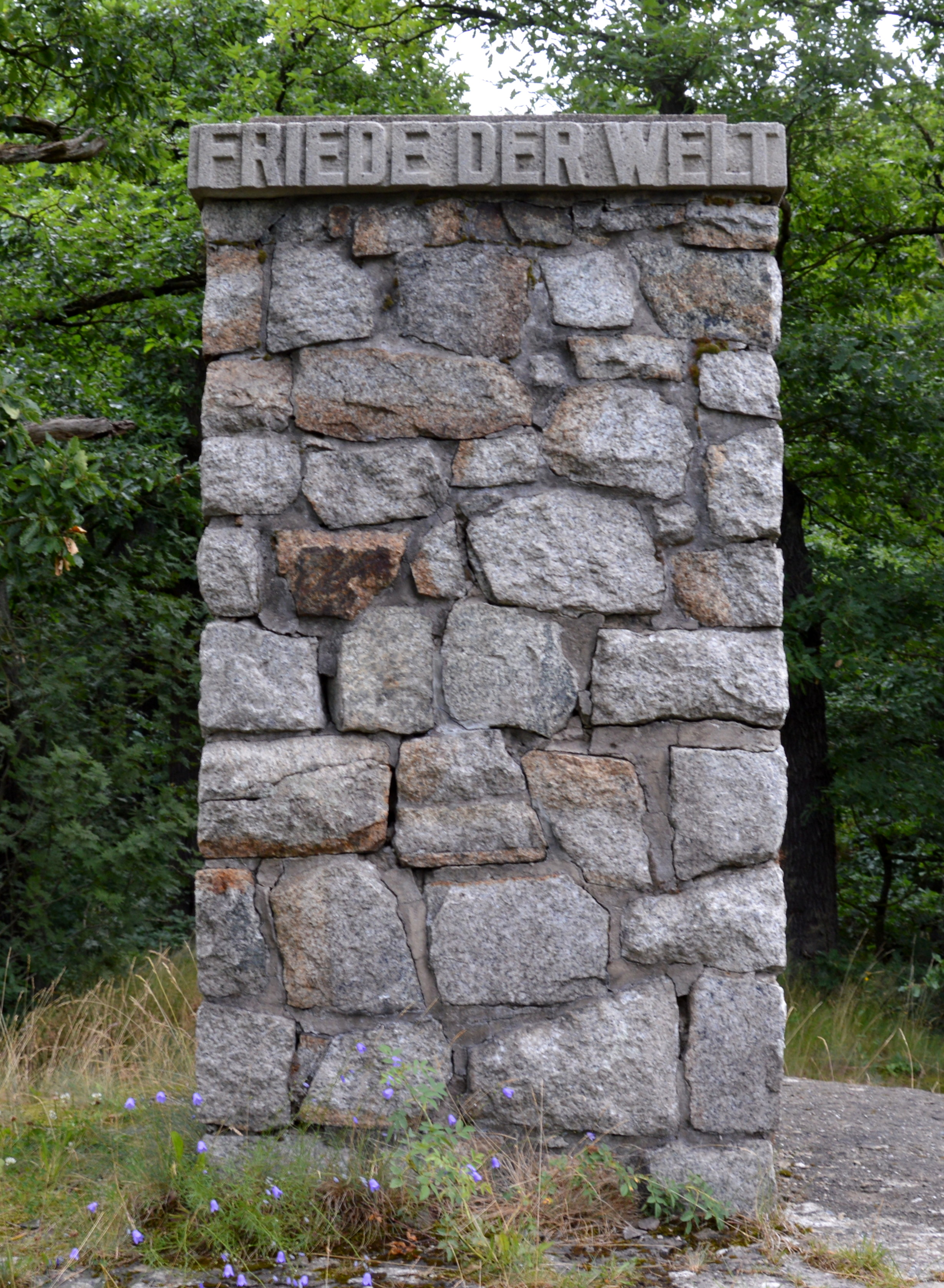 Friedensdenkmal Alexisbad